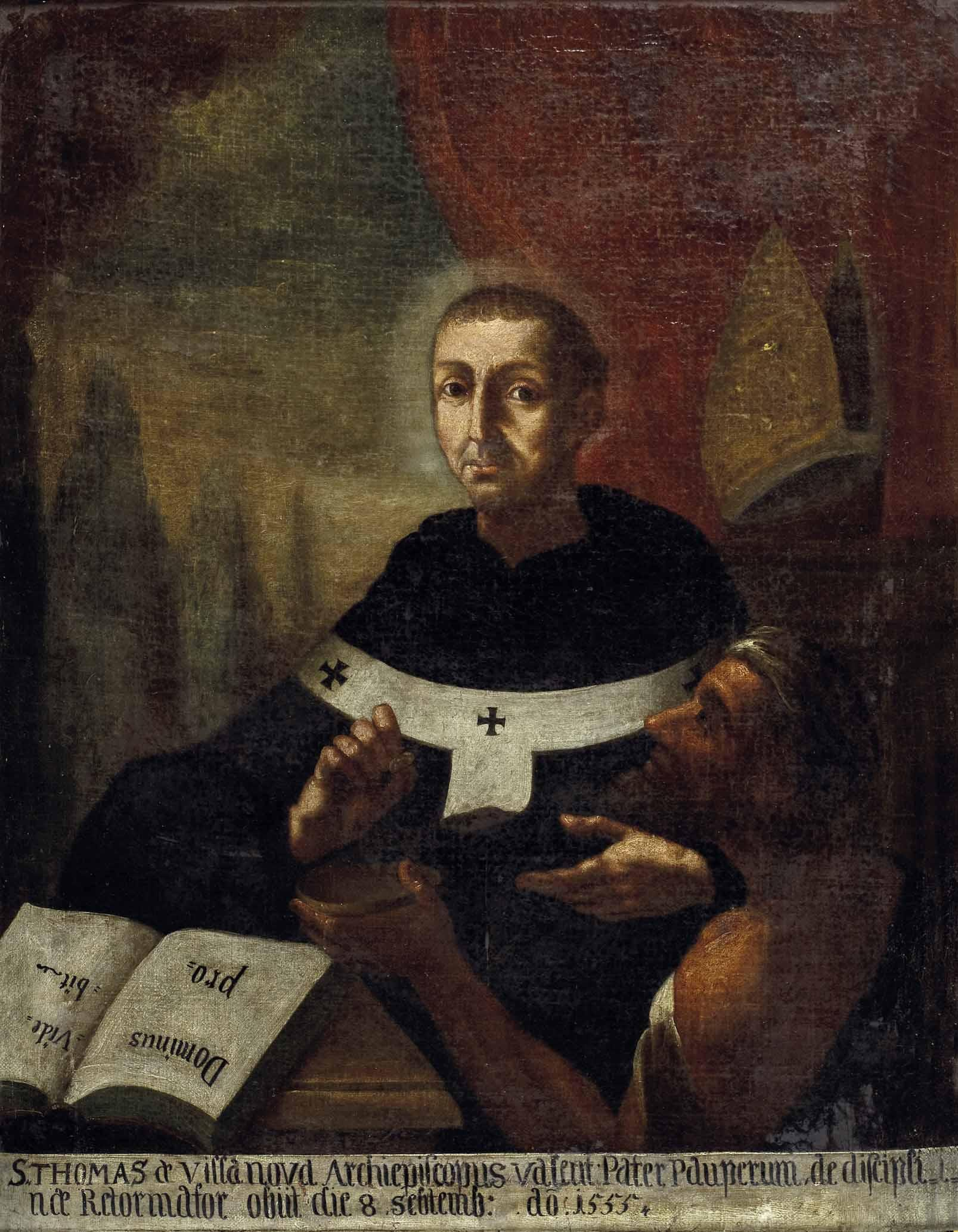 "Der Hl. Thomas von Villanova, Augustinereremit, Erzbischof (Fuenllana bei Villanova 1486 - 1555), mit Pallium, gibt einem Bettler eine Gabe" (das aufgeschlagene Buch enthält die Inschrift: Dominus providebit, Gott wird vorsorgen, unten beschriftet: S. Thomas de Villanova Archiepiscopus vasent Pater pauperum de disciplinae Reformator. obiit die 8. septembris ao 1555), Öl auf Leinwand, ca. 103 x 79 cm